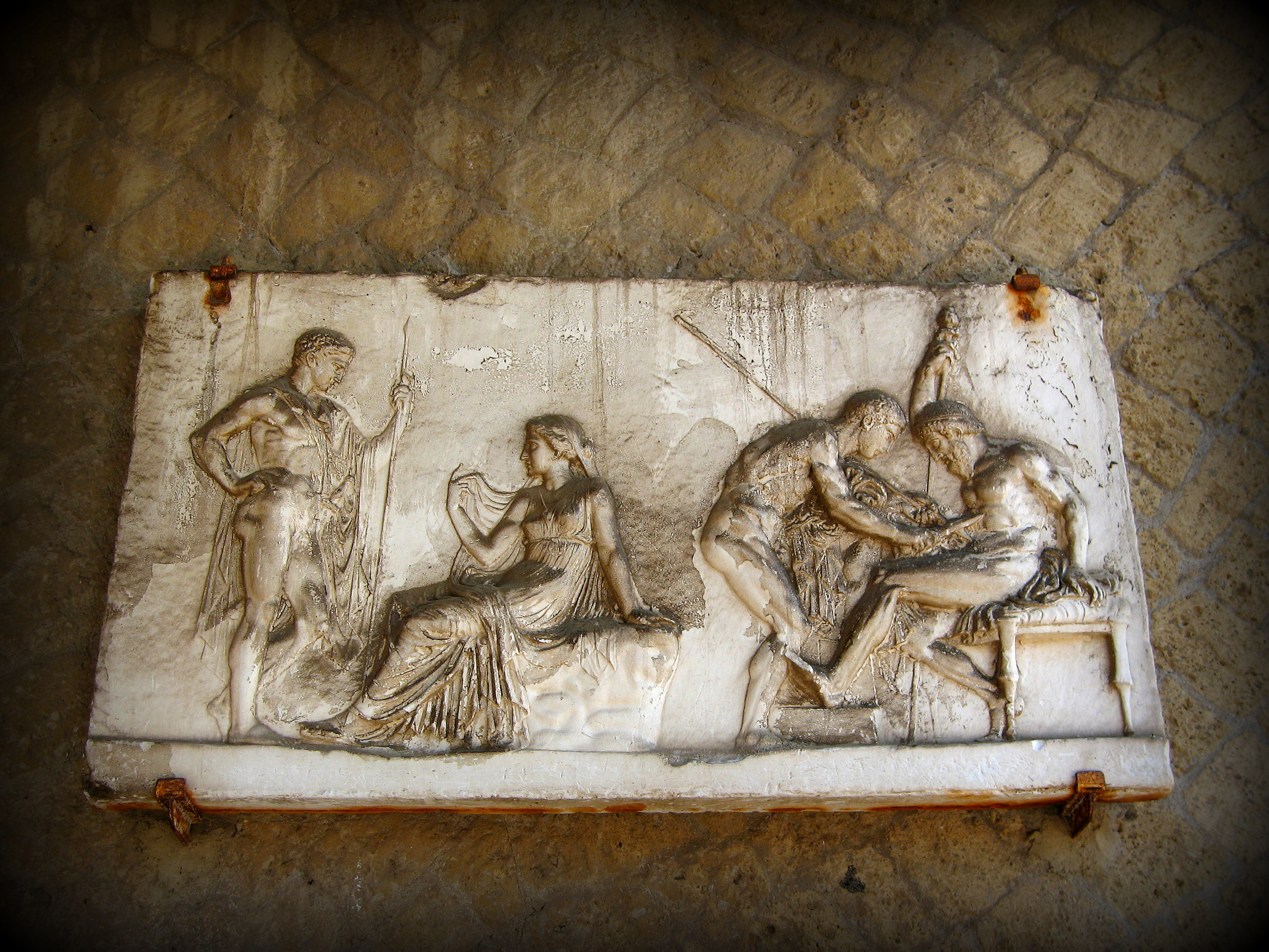 Casa del Rilievo di Telefo - MIBAC This is a photo of a monument which is part of cultural heritage of Italy.